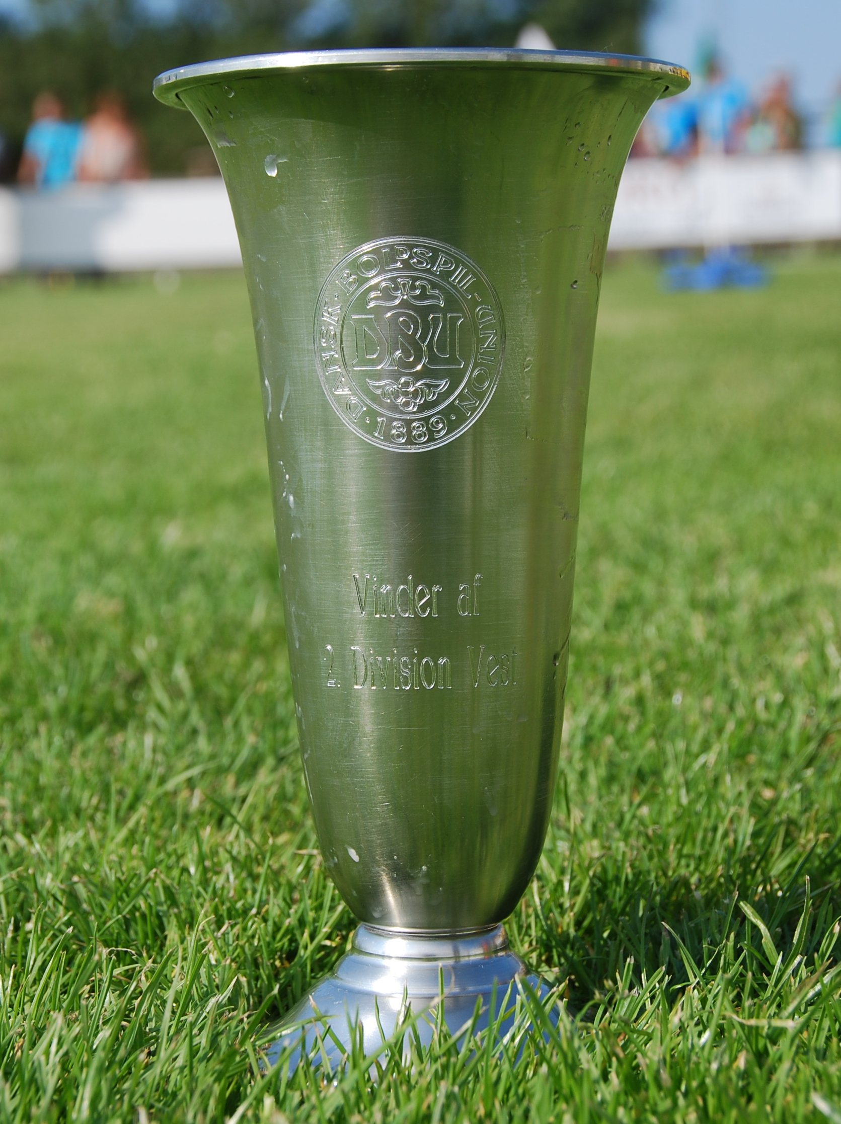 Trofæet til vinderen af 2. division Vest i Danmark.